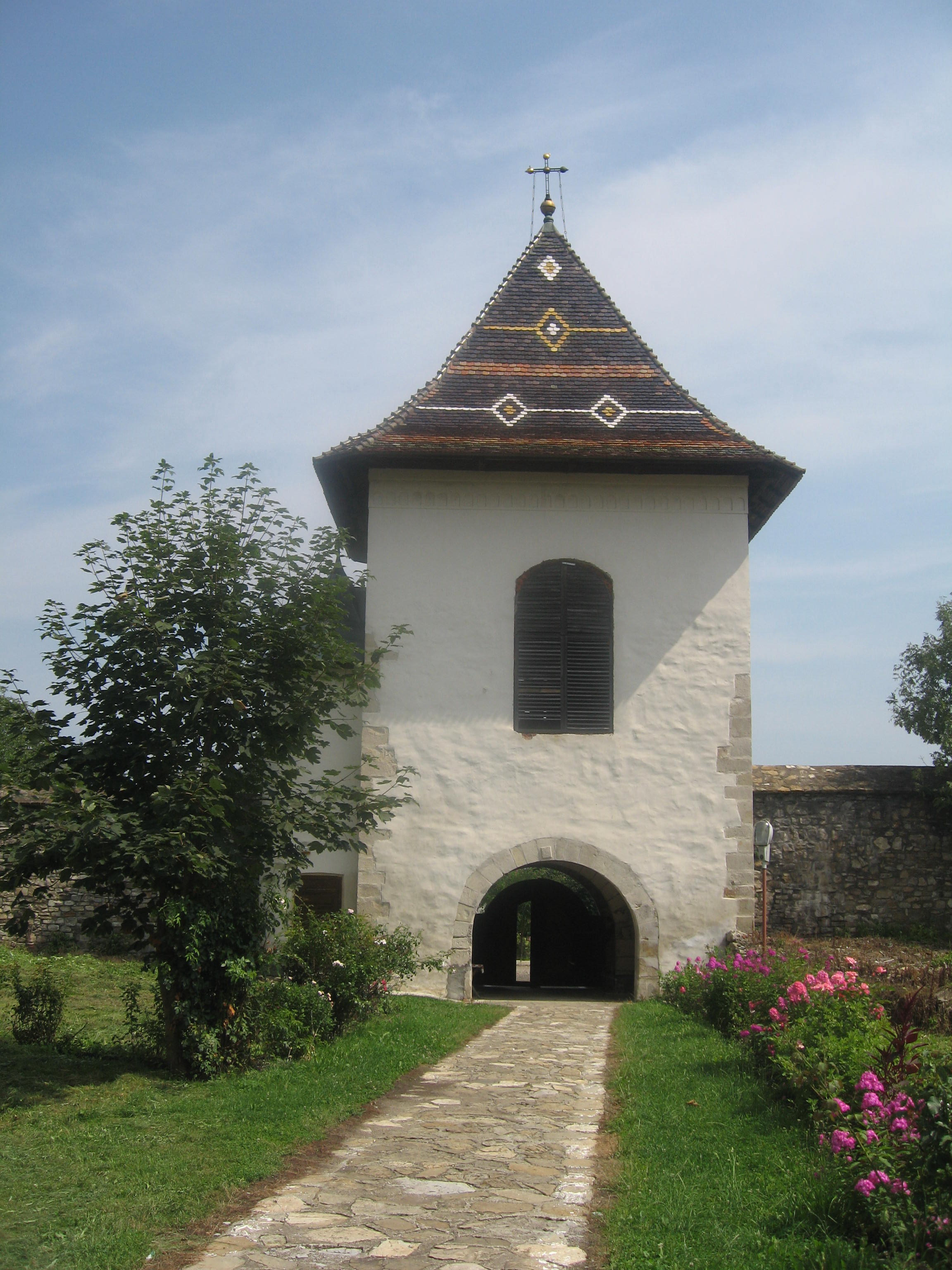 Biserica "Sf. Apostoli Petru și Pavel" din Solca 06